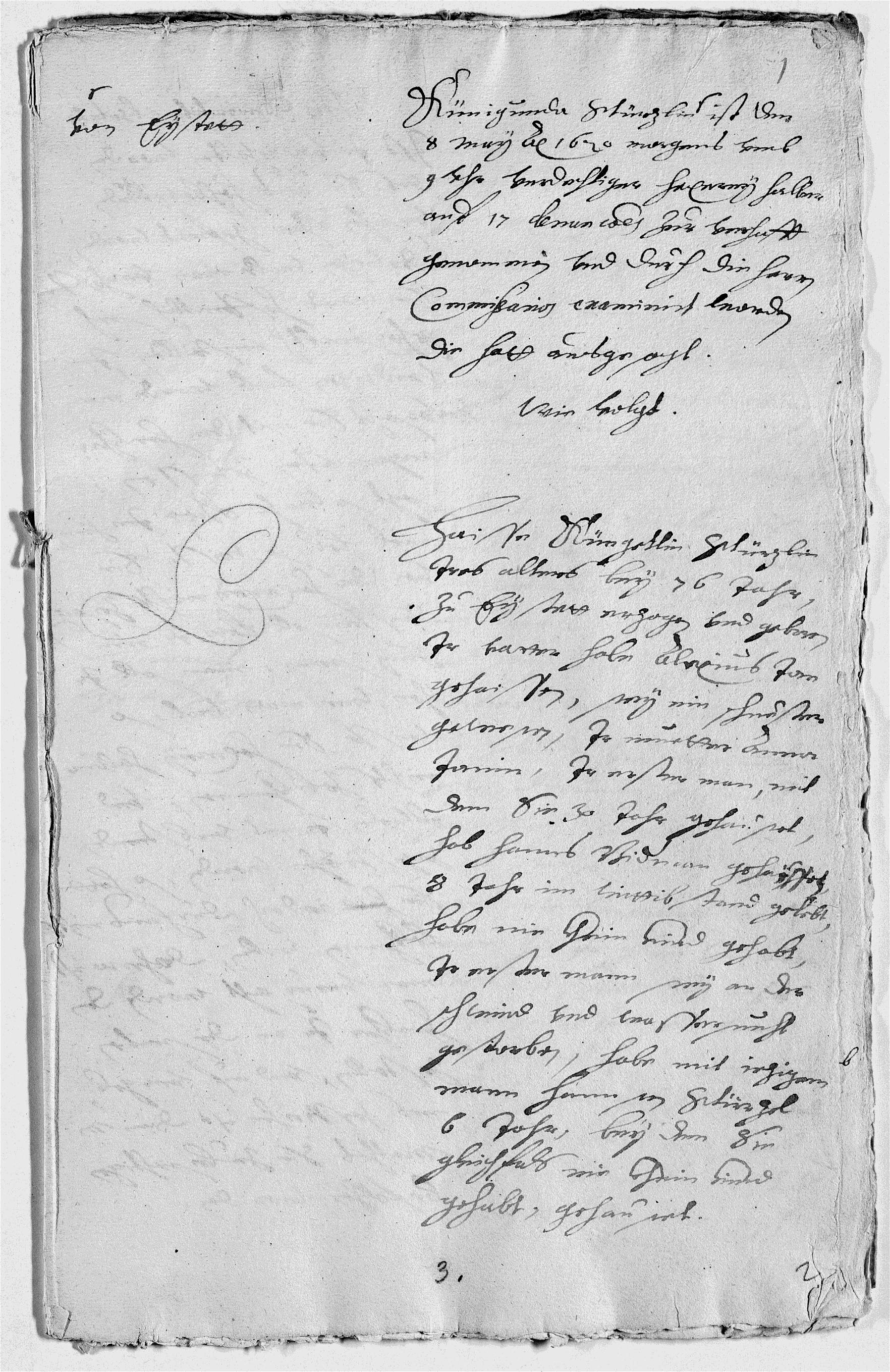 Verhörprotokoll des Hexenprozesses gegen Kunigunde Sterzl in Eichstätt bestehend aus insgesamt 60 Seiten. Dargestellt ist eine von 60 Seiten.